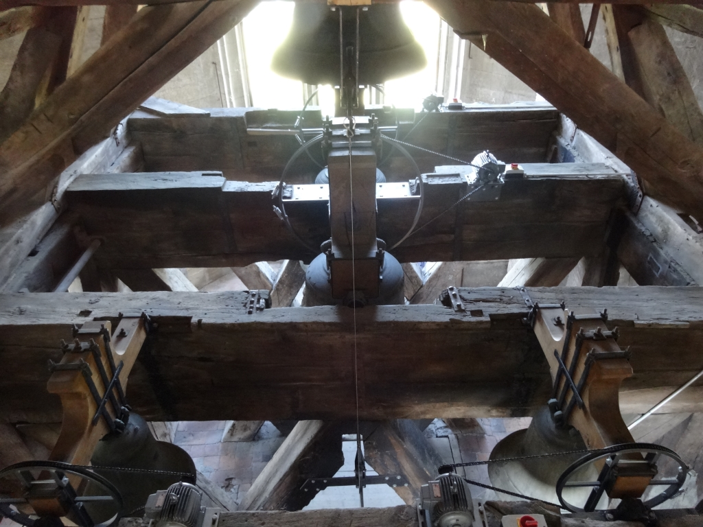 Cathédrale St-Nicolas de Fribourg (Suisse). Une partie des cloches de la deuxième chambre des cloches.